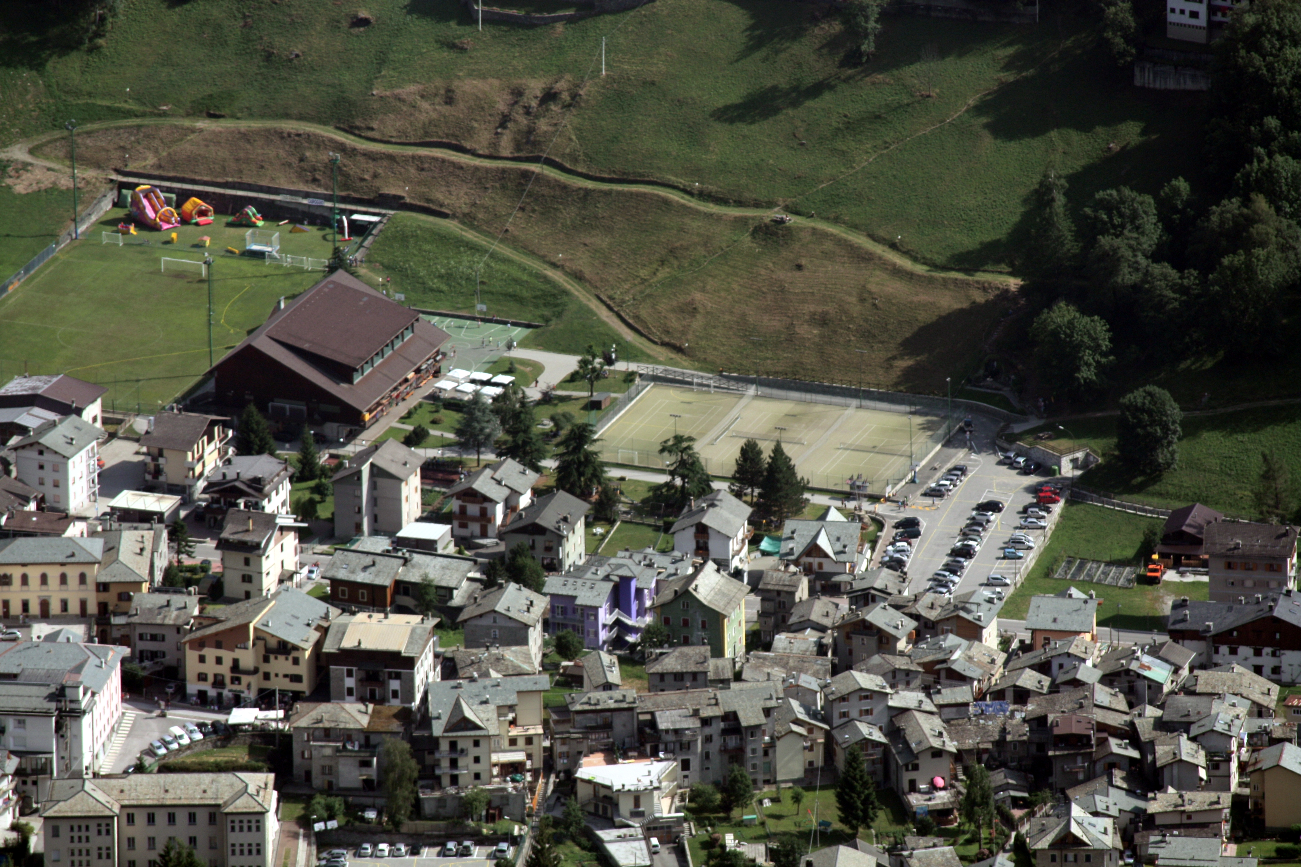 Veduta del centro sportivo di Caspoggio